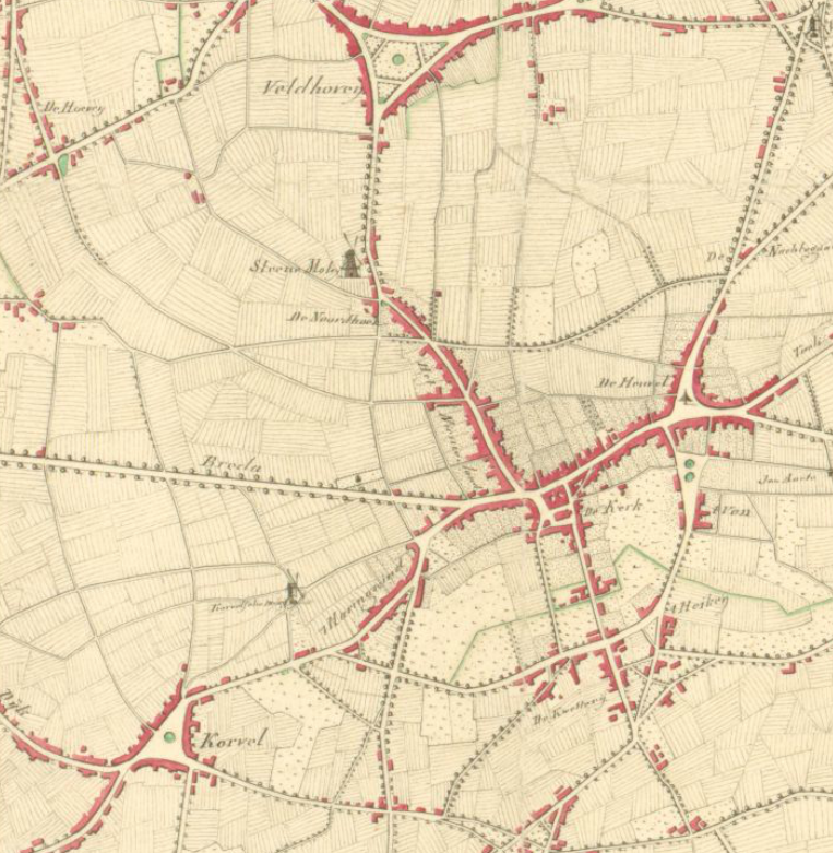 Herdgangen in tilburs